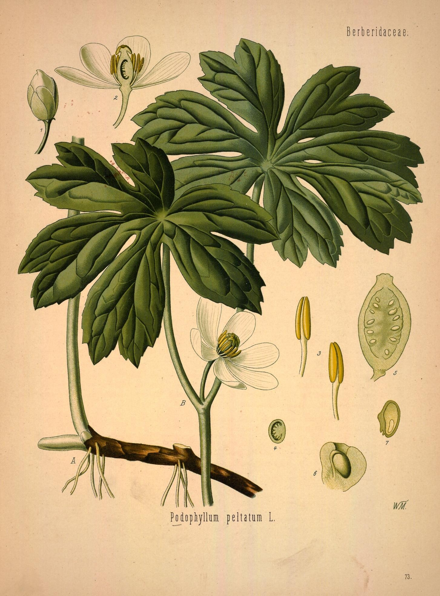 Schildförmige Fußblatt. A B Theile der Pflanze in natürl. Grösse; 1 Blüthenknospe, desgl.; 2 Blüthe im Längsschnitt, desgl.; 3 Staubgefässe, vergrössert; 4 Fruchtknoten im Querschnitt, natürl. Grösse; 5 Frucht im Längsschnitt, desgl.; 6 Theil des Samenmantels, mit eingesenktem Samen, vergrössert; 7 Same im Längsschnitt, desgl.